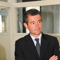 Franck Marlin